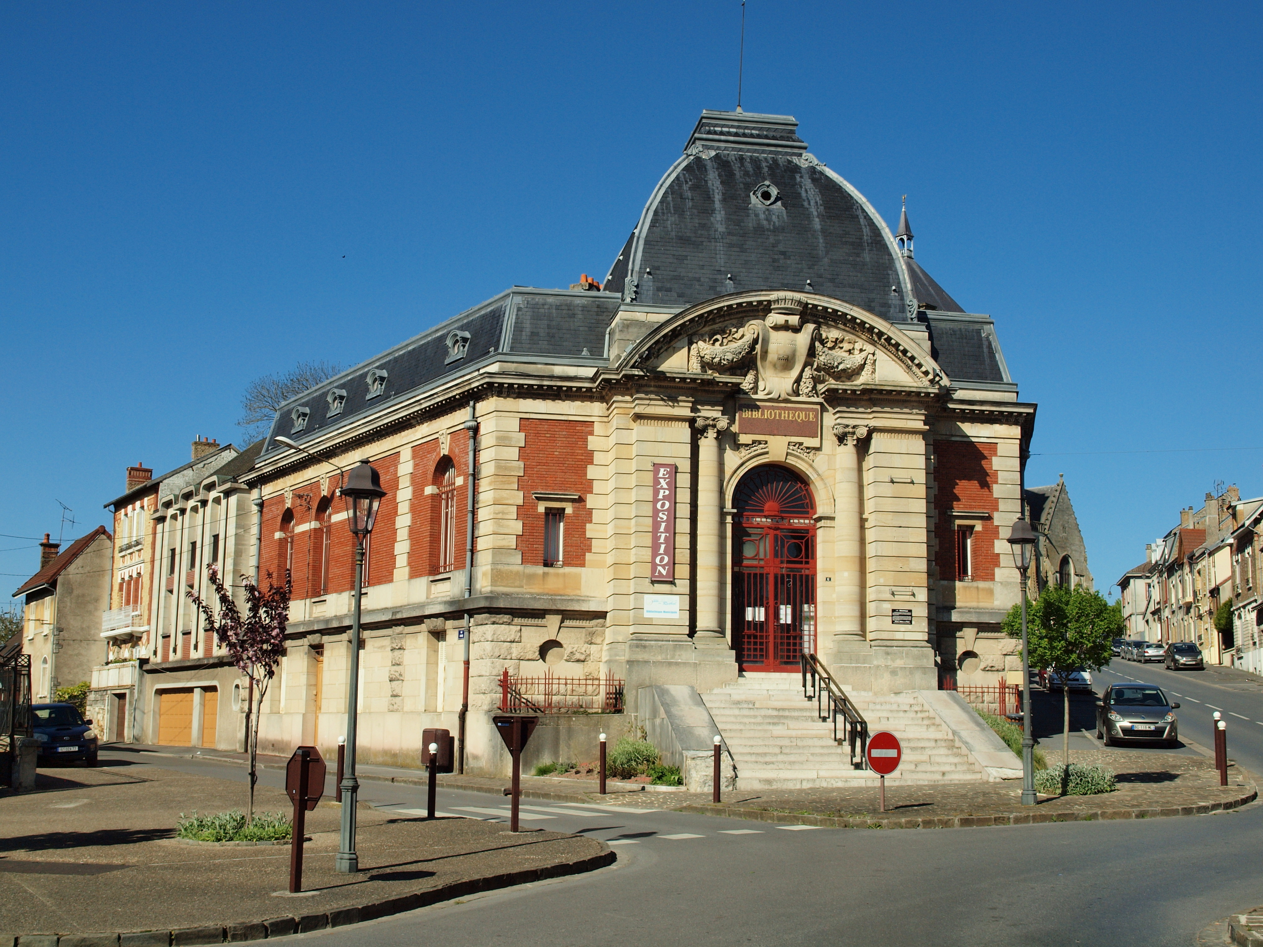 Rethel (Ardennes, France)